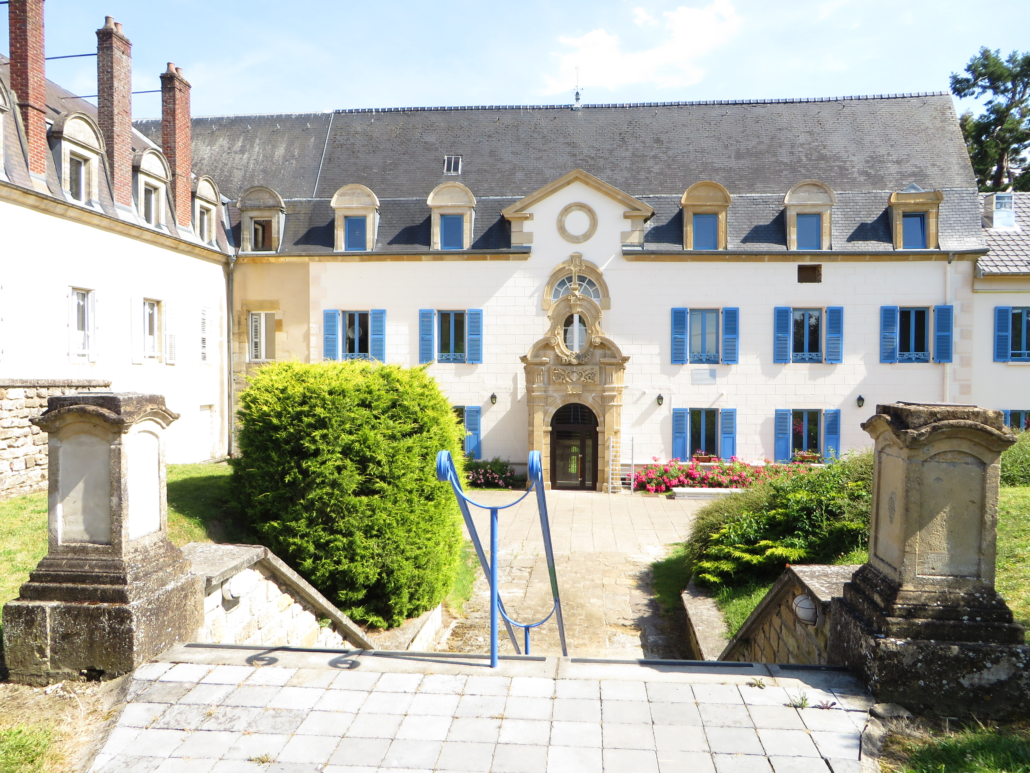 Juvigny-sur-Loison Ancienne abbaye de bénédictines Sainte-Scholastique